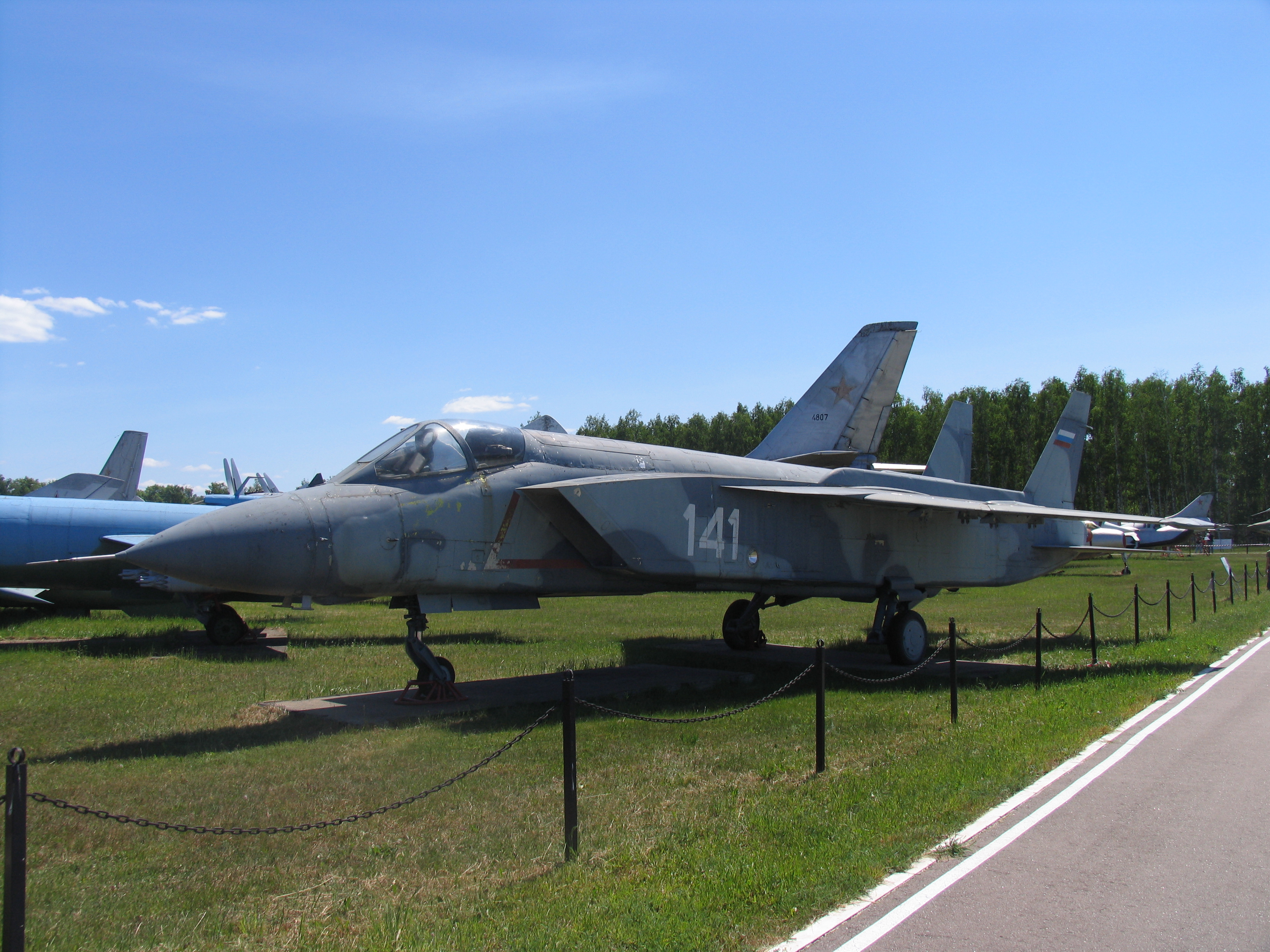 Як-141 - предсерийный образец. Музей ВВС.